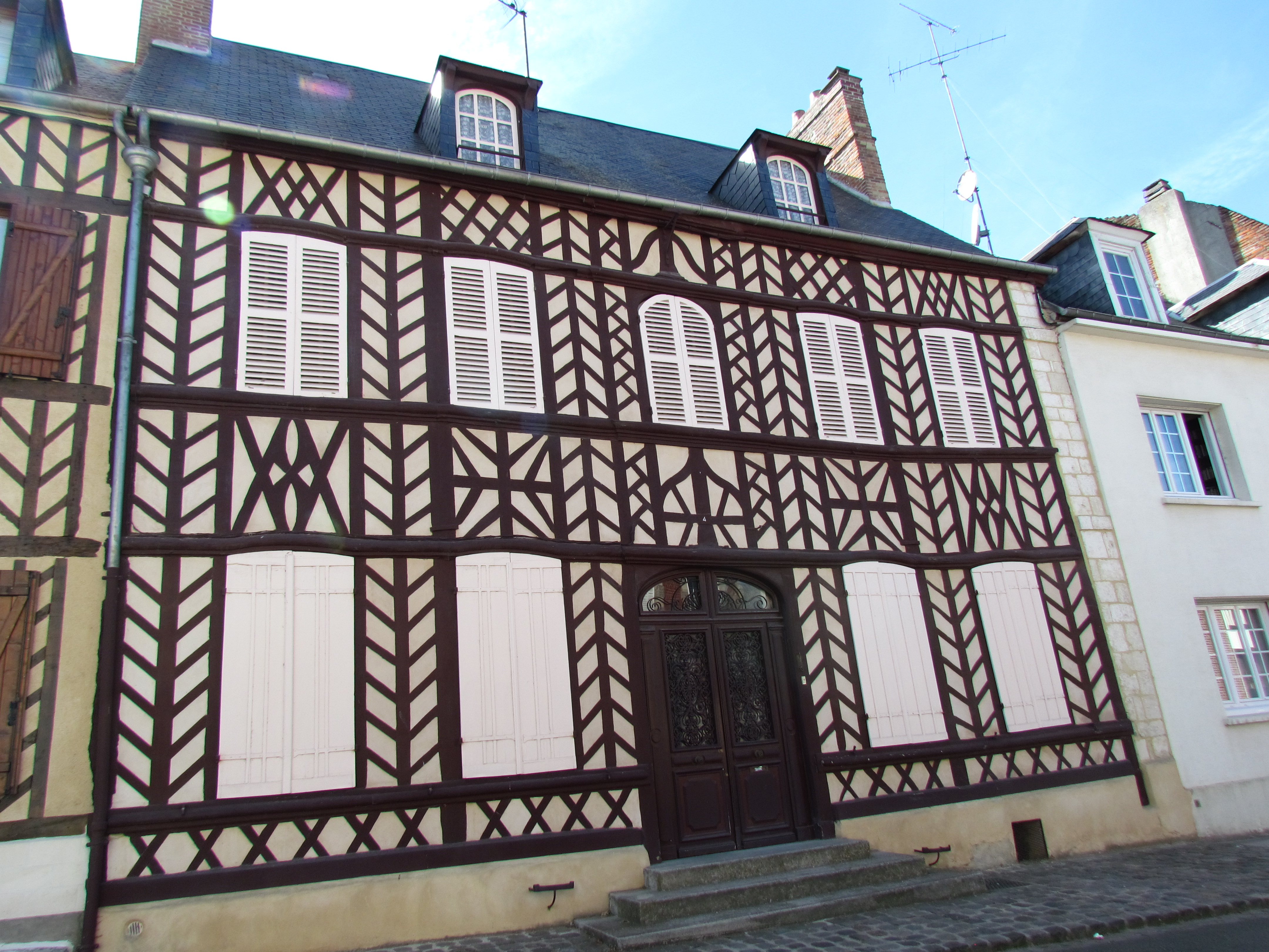 Maison natale d'Hippolyte Bayard, 4 place Bayard, à Breteuil (Oise, France) .